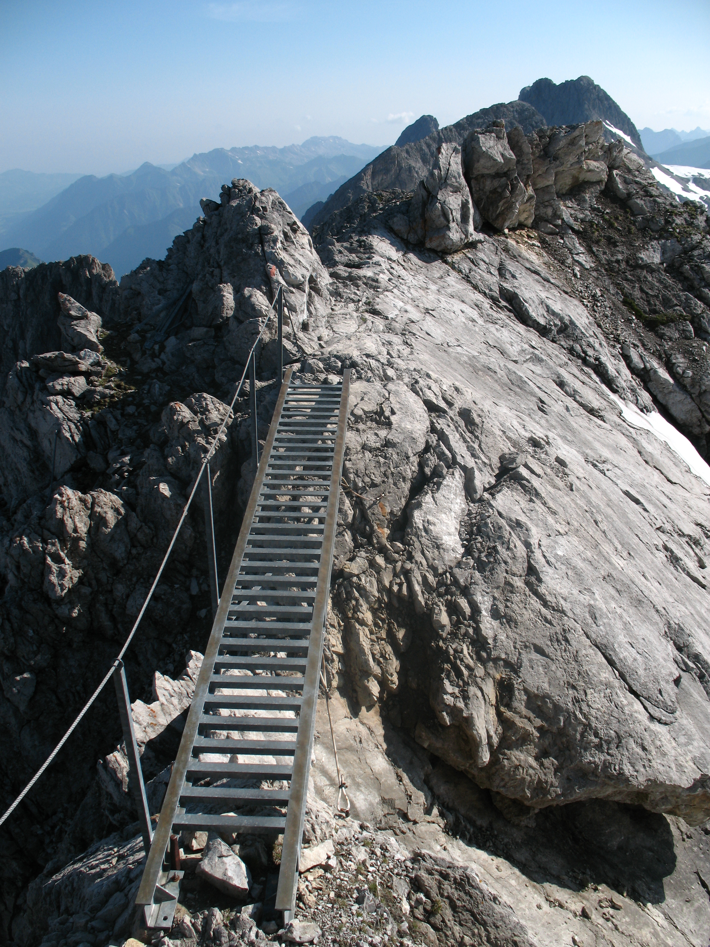 Die Leiter-Brücke am Gipfel des Steinschartenkopf (2615 m) mit Blick nach Norden zum Bockkarkopf (2609 m) und der Hochfrottspitze (2649 m).